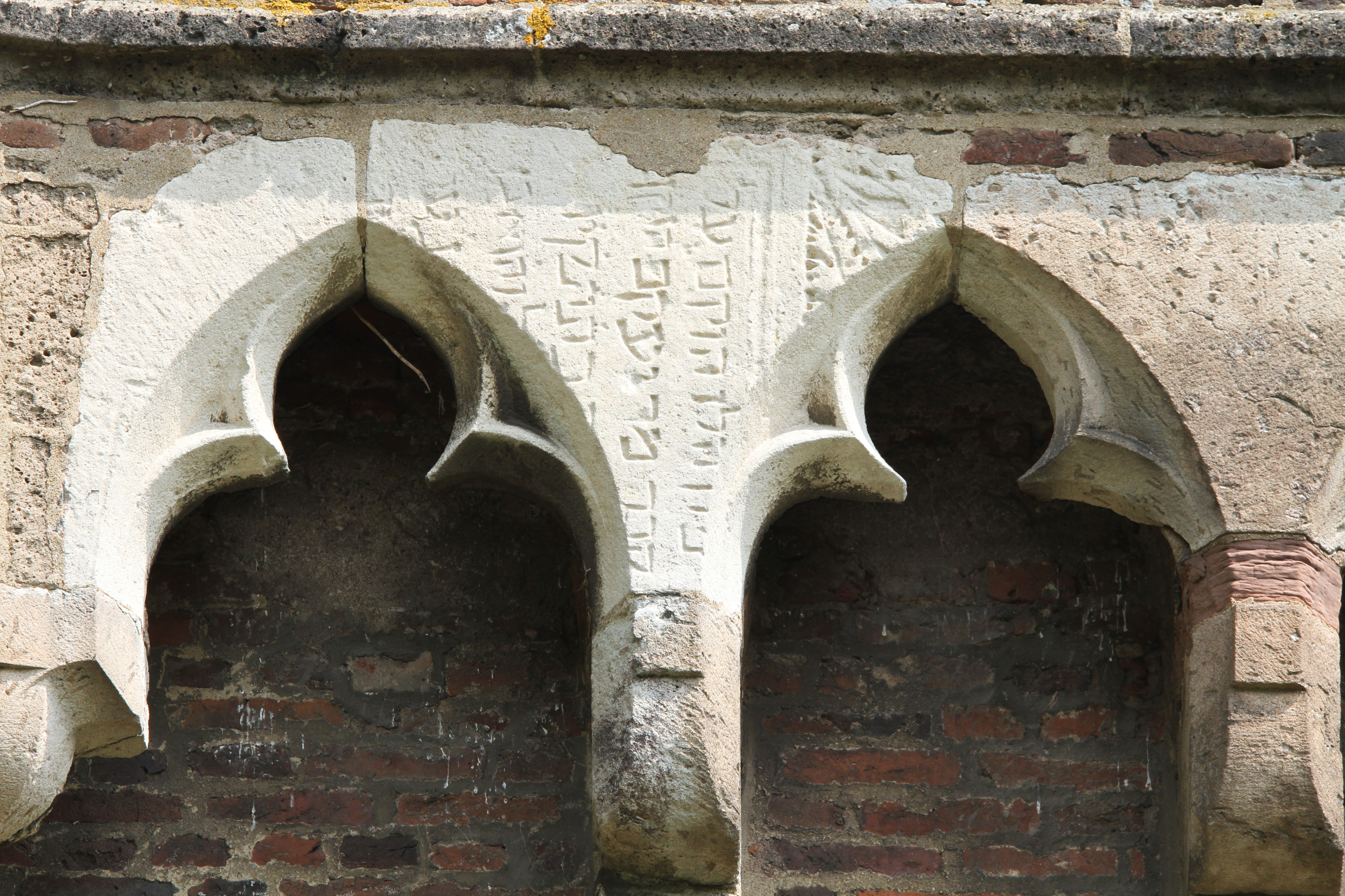 Grabstein des 1156 verstobenen Rabbiners Jacob aus Köln. Er befindet sich heute im Mauerwerk der Landesburg Lechenich